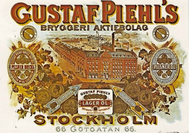 Reklamaffisch till C G Piehls Bryggeri